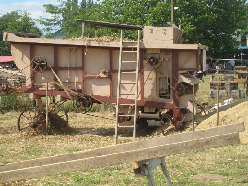 batteuse la chevallerais